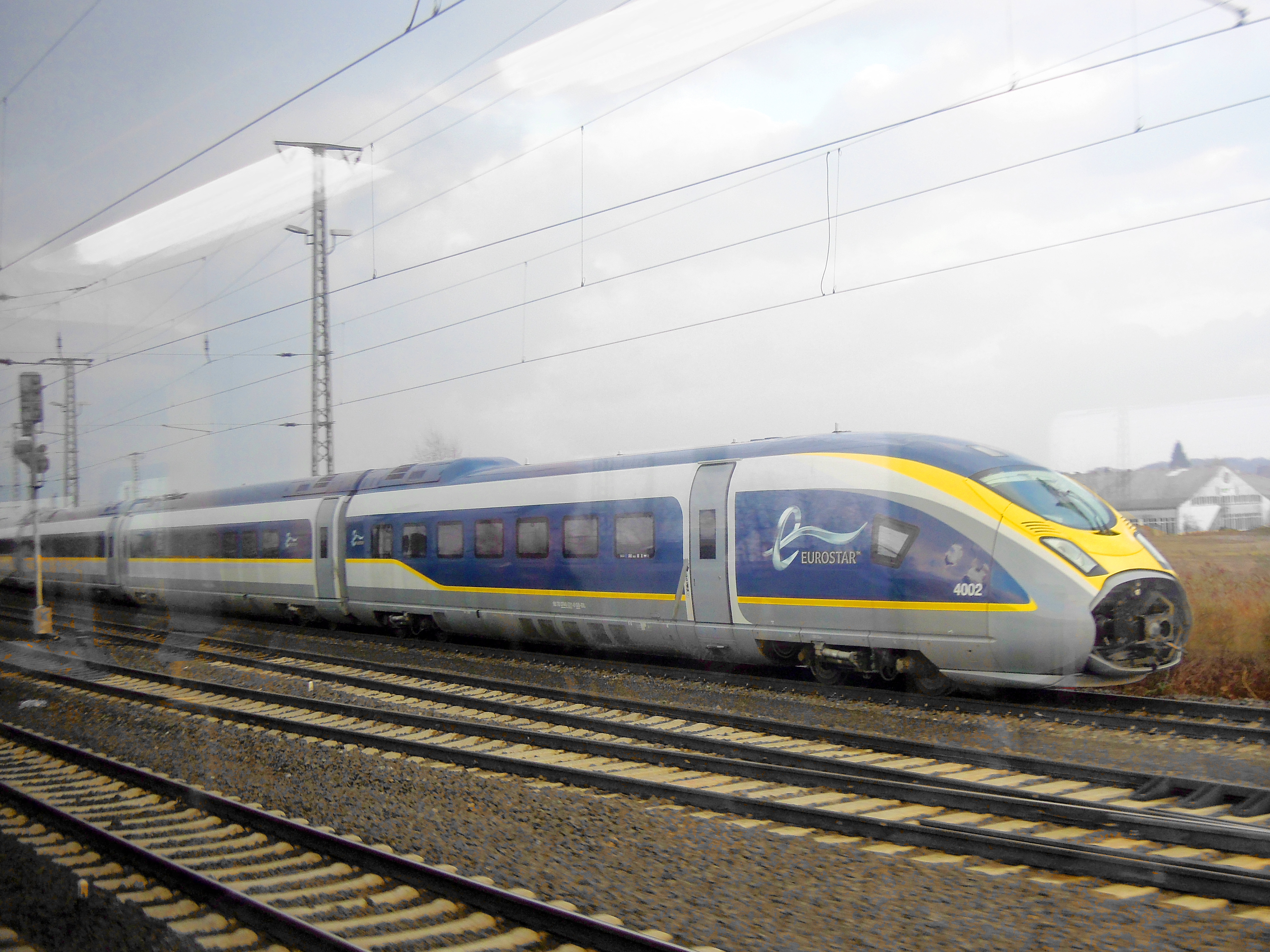 Ein neuer Eurostar-Triebzug von Siemens, Nummer 4002, bei seiner Überführung im Februar 2015.